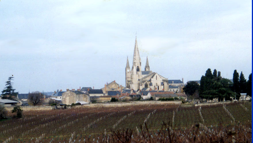 Le Puy-Notre-Dame : la Collégiale vue du coteau